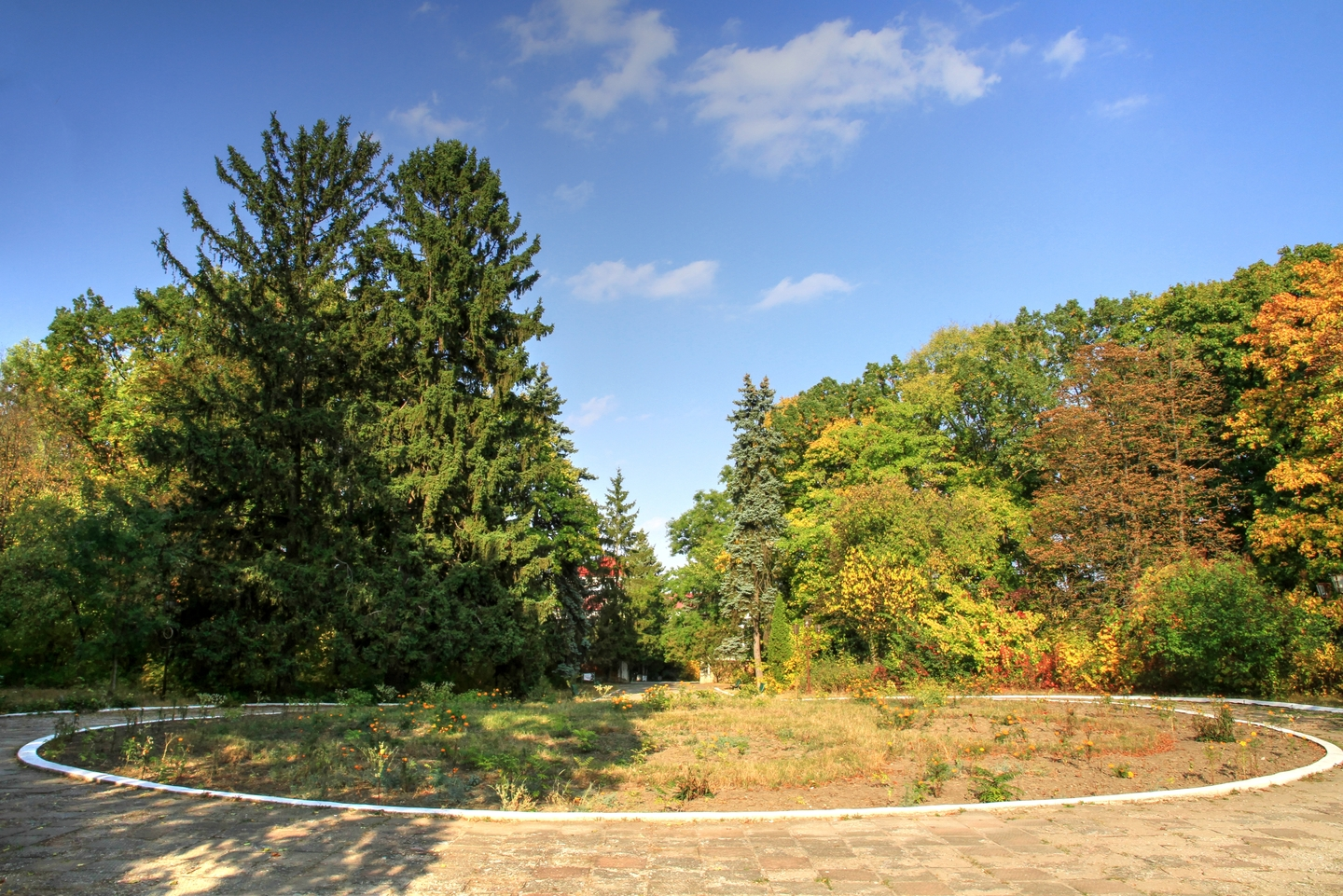 Цаулский парк, монумент природы, находится в Дондушенский район, с. Цаул (код MD-DN-map-010)